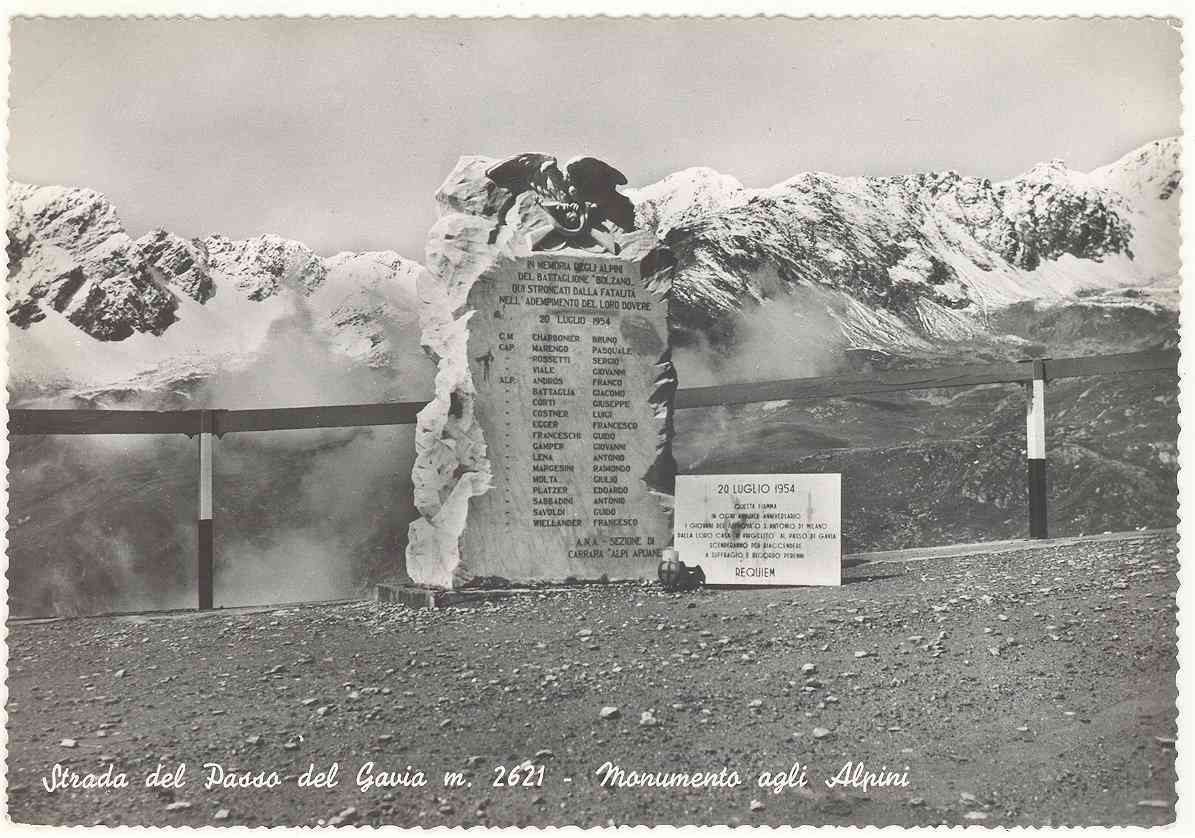 BS strada del Passo del Gavia m.2621 - monumento agli Alpini